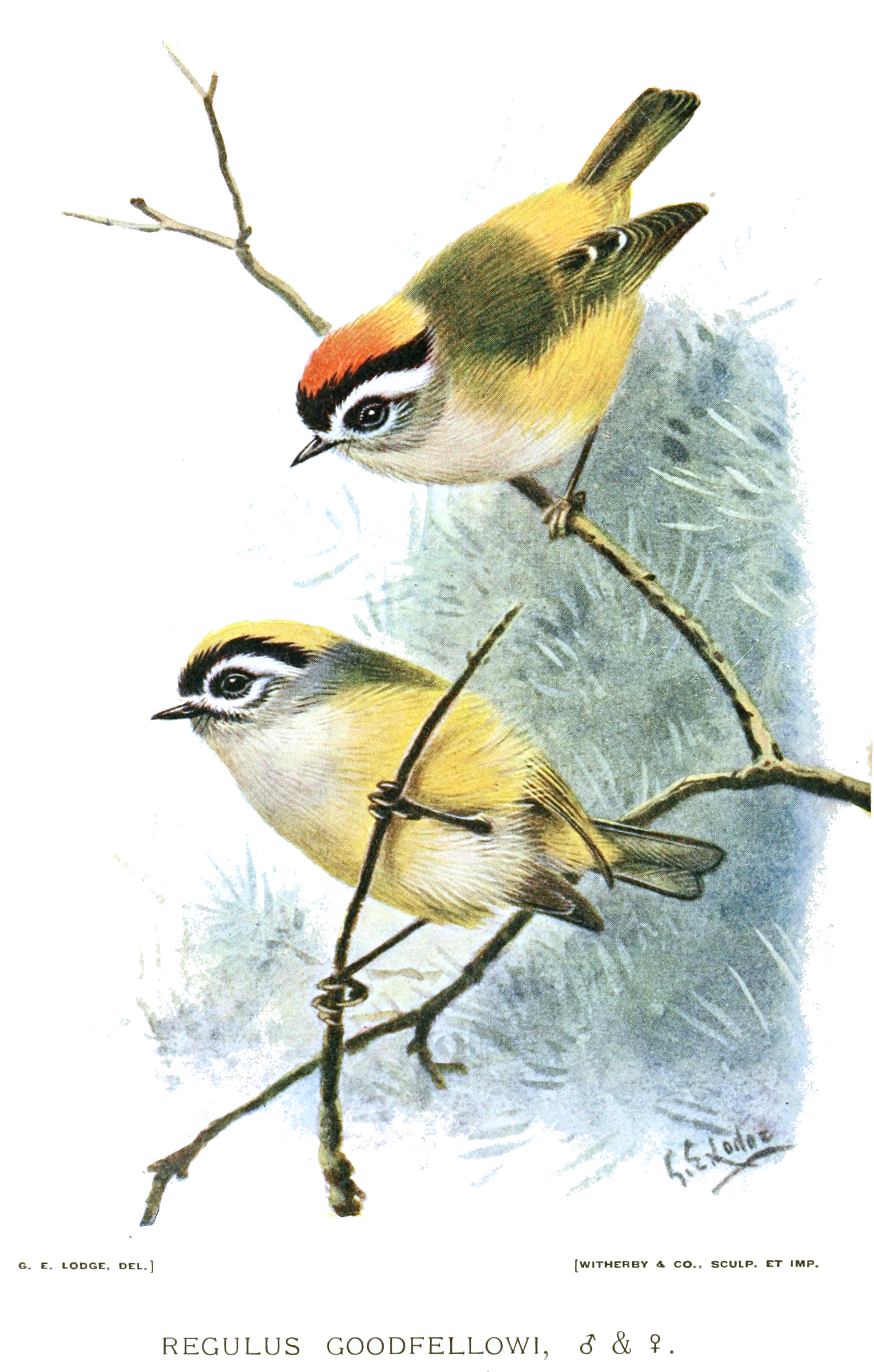 Regulus goodfellowi